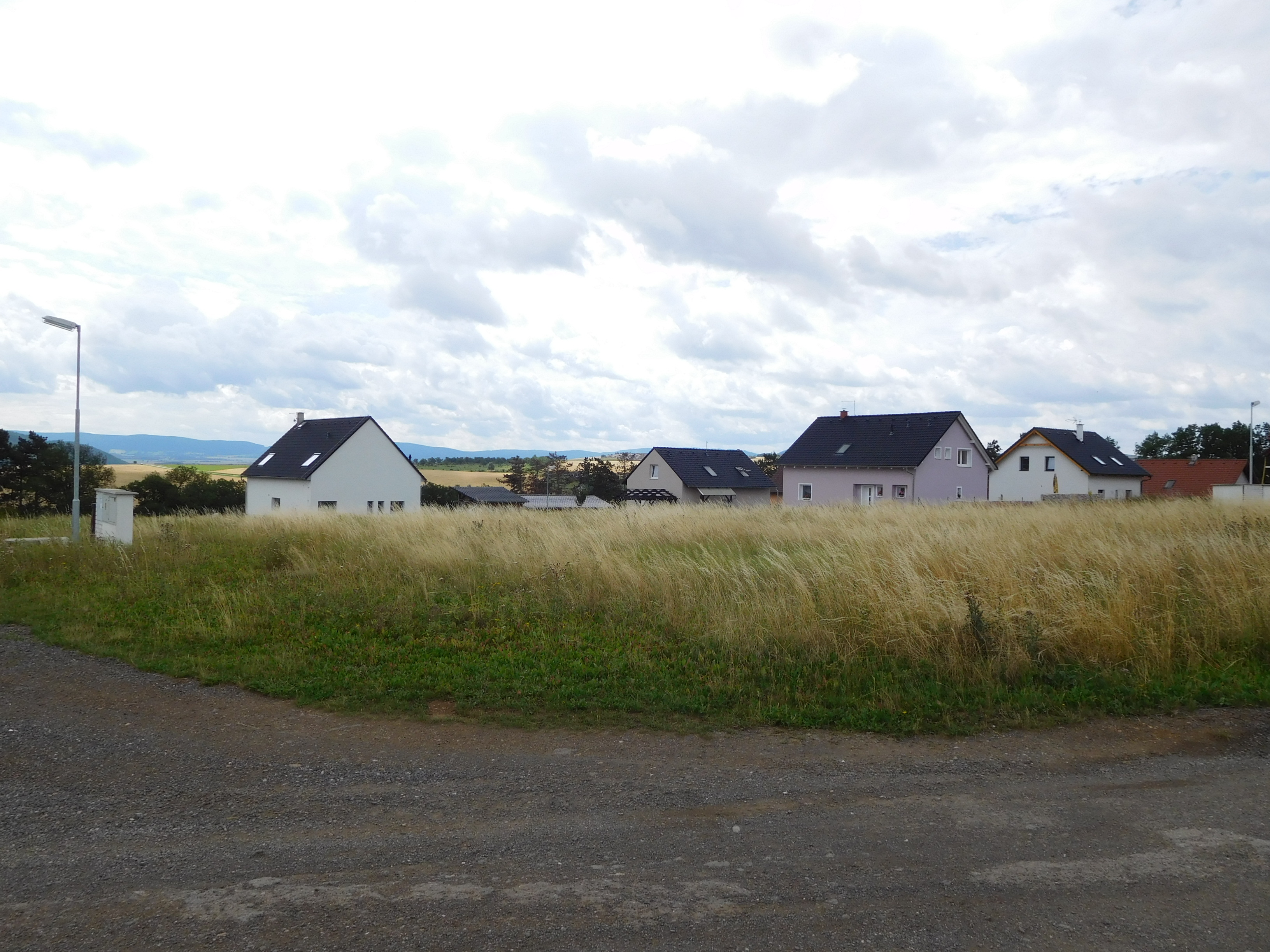 Bavoryně - U Vodojemu - jižní část